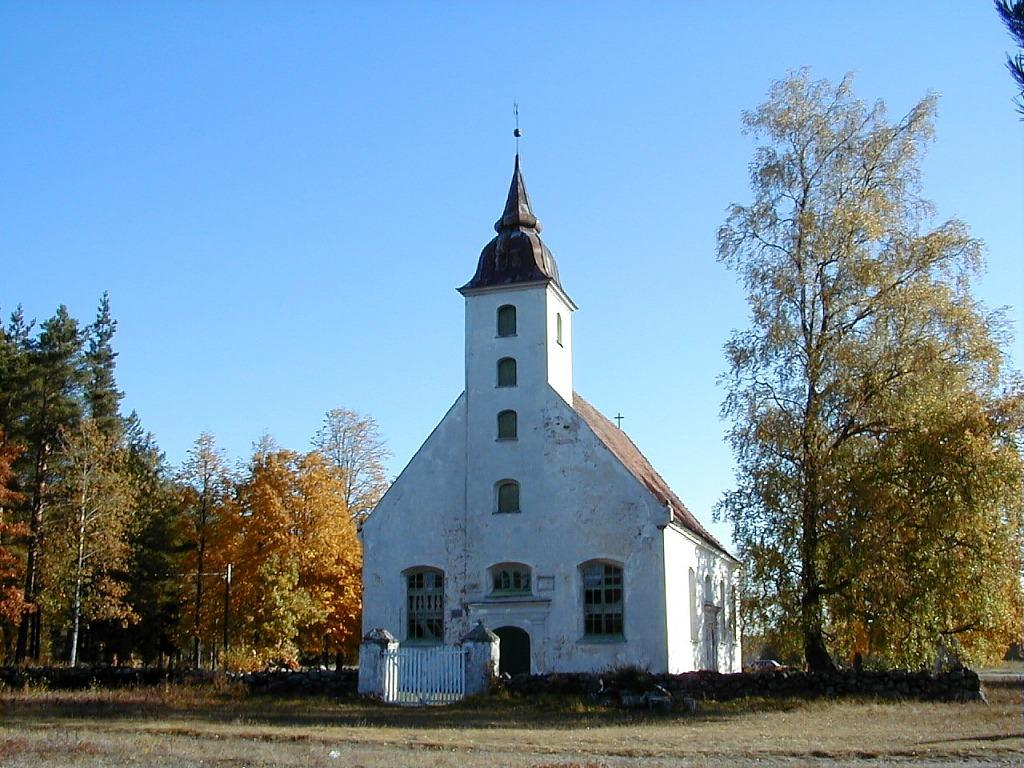 Skultes baznīca 2000-10-01